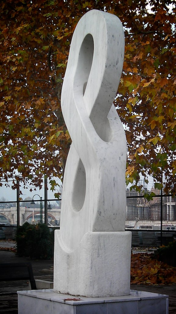 Sculpture in Skopje, Macedonia